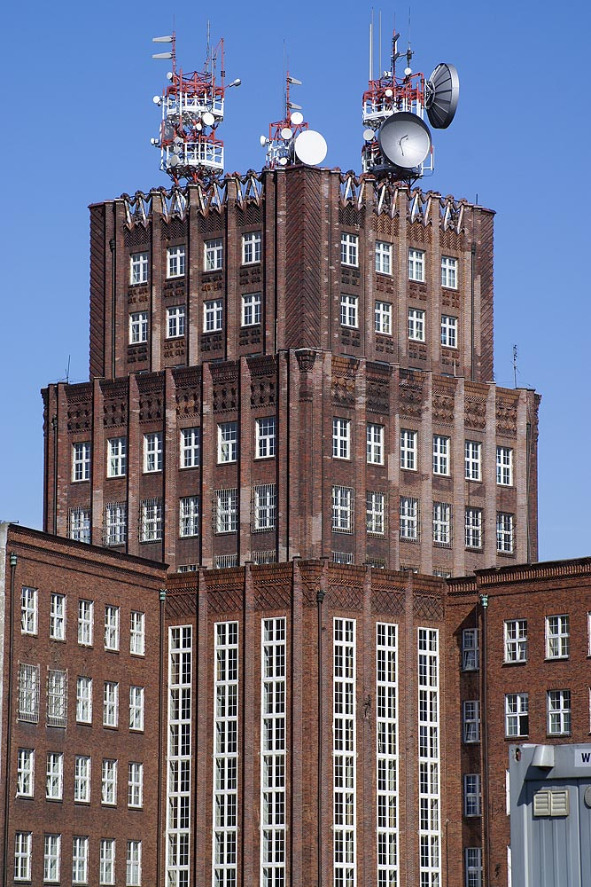 Budynek Poczty Na działce geodezyjnej Nr 3, AM-1, obręb Południe Krasińskiego 2, Miasto Wrocław - Śródmieście